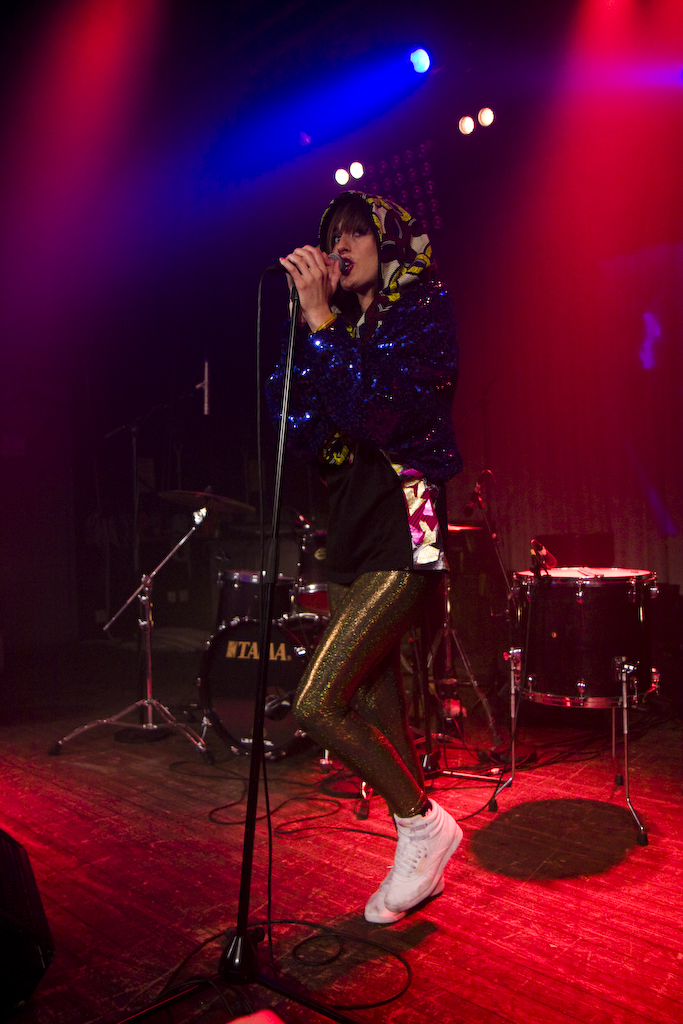 Yelle at Arvikafestivalen 2008.